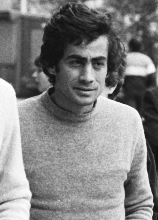 Morgen speelt Feyenoord tegen Dynamo Tiflis om de Europacup-II, de top van Dynamo Tiflis v.l.n.r. Gutzaev